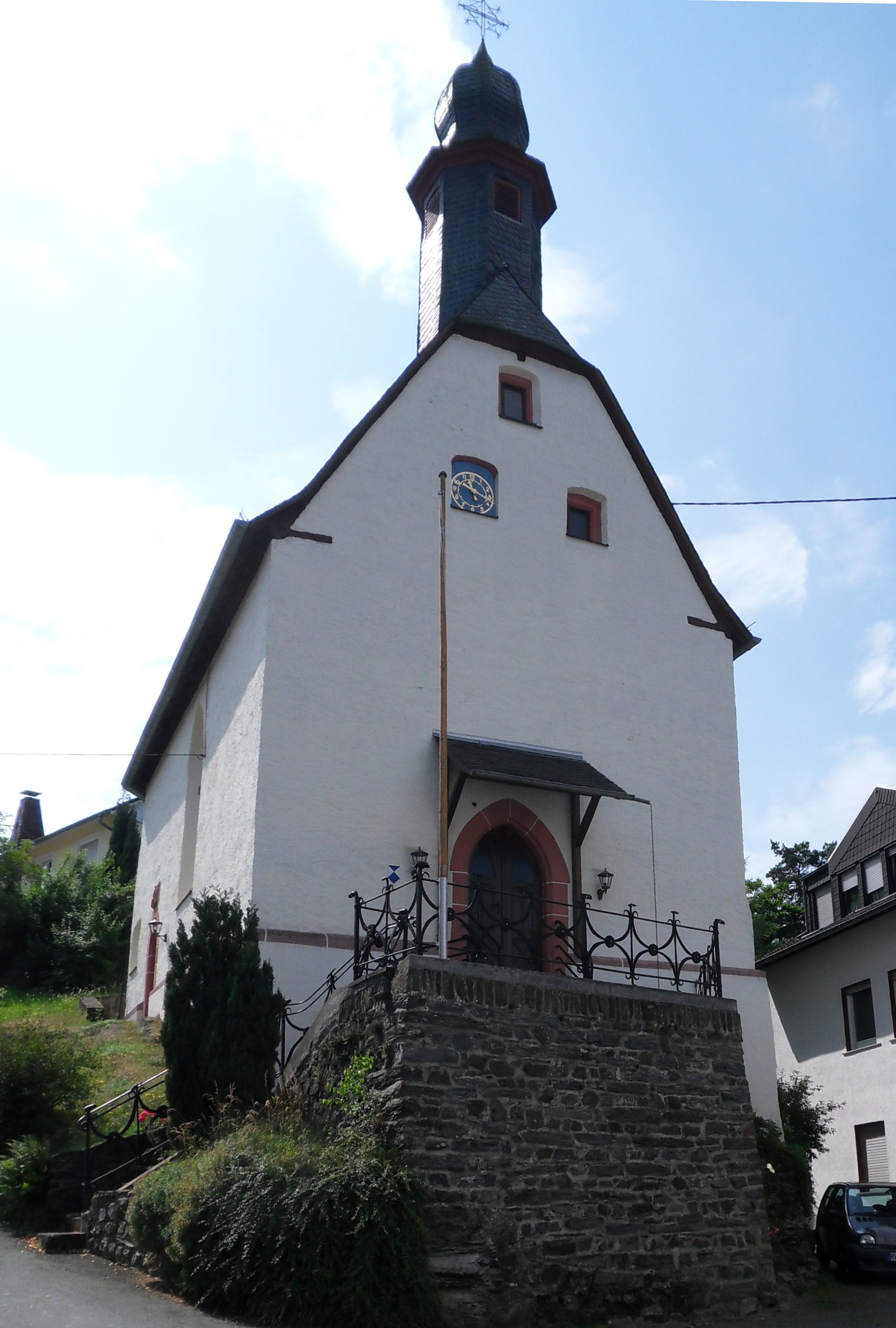 Ehemalige Valentins- oder Burgkapelle in der Burgstraße in Adolfseck, Blick von Nordwesten